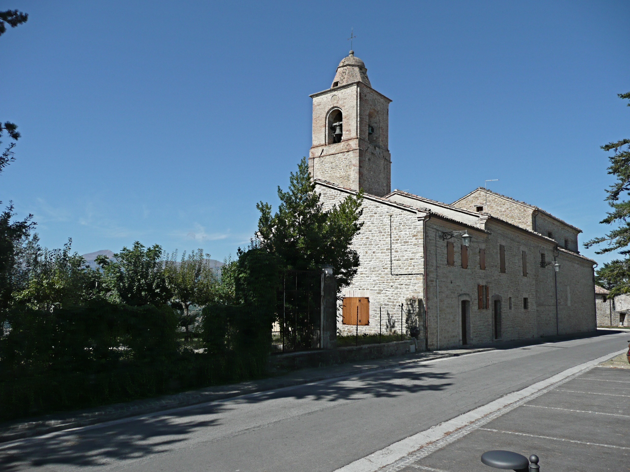 Chiesa di Monte San Martino